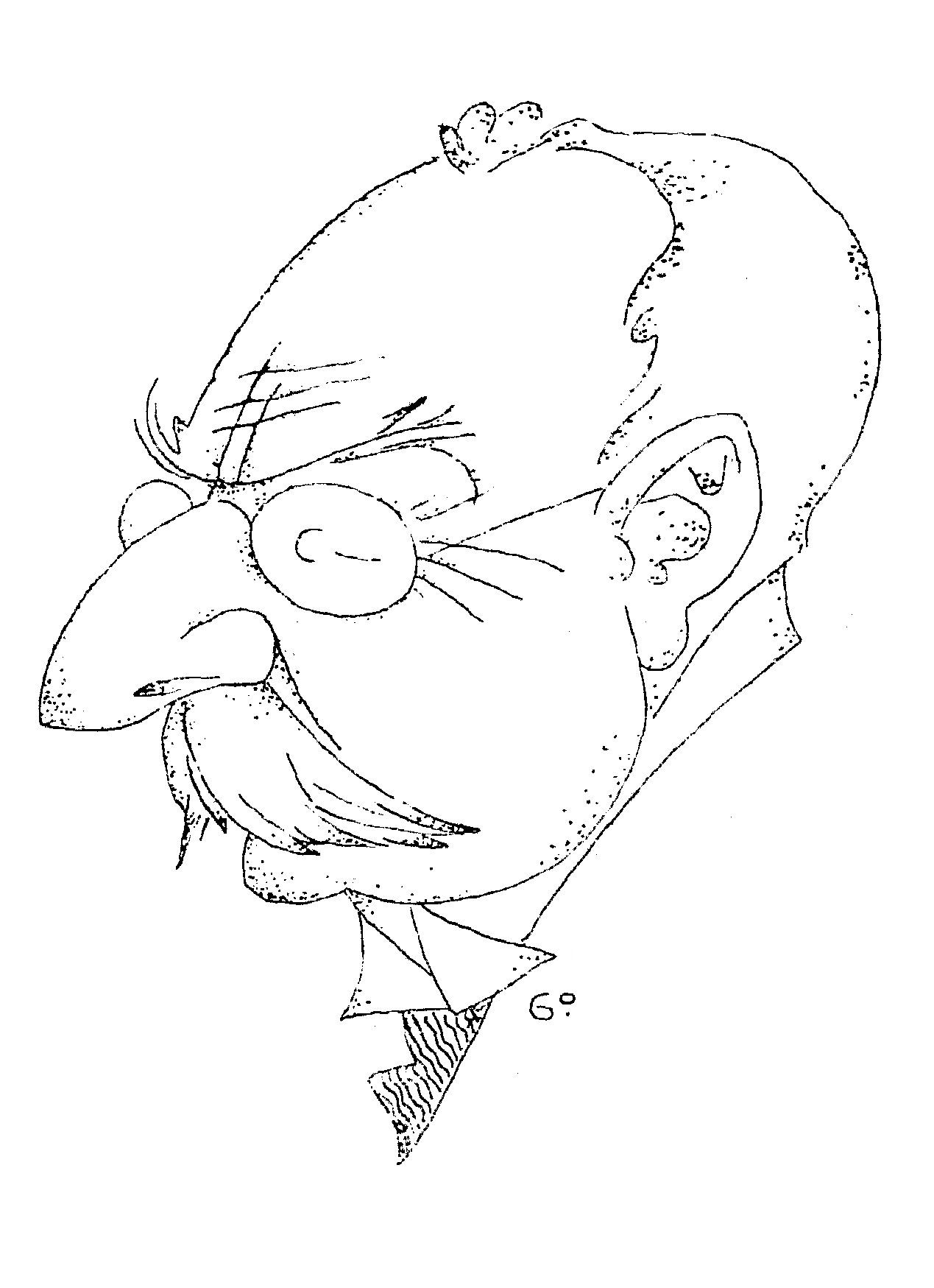 Gori karikatur Kustas Kostarist